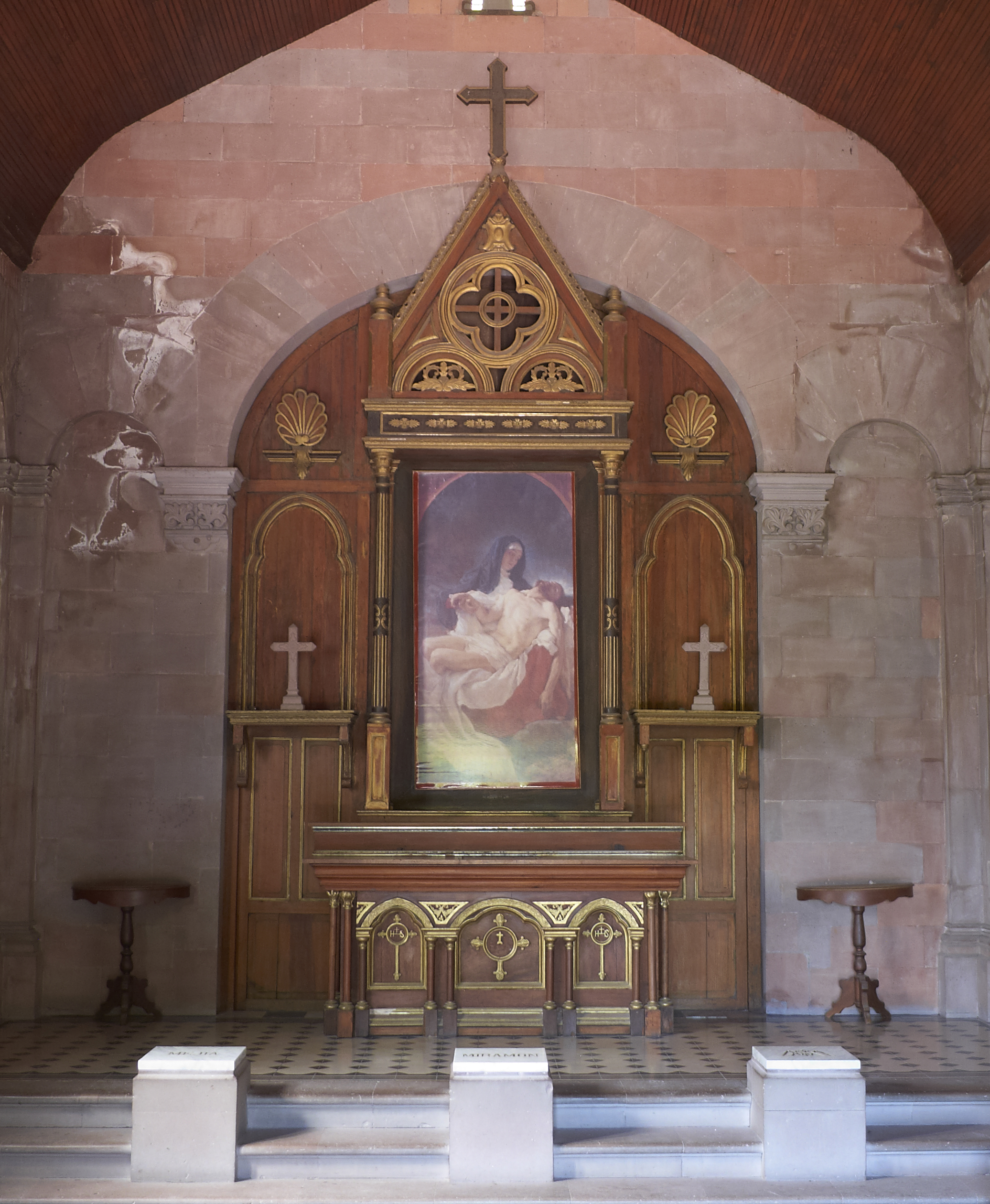 Interior de la Capilla de Maximiliano de Habsburgo en el Cerro de Las Campanas, Queretaro. De izquierda a derecha las columnas de Mejia, Miramon y Maximiliano.